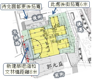 中文（台灣）: 文林苑建築改善原居住環境